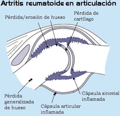 Gráfica de una articulación con artritis reumatoide. Detalle del original tomada de y traducida al español. El original está compuesto por dos imagenes de las cuales solo se tomó una he:תמונה:Rheumatoid arthritis joint.heb.GIF